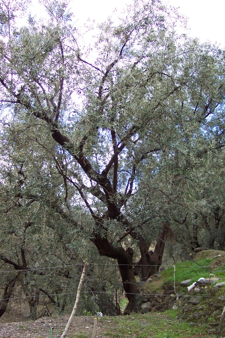 Olivos de Alcolea Olivos de Alcolea de Almería Fotografía realizada por José Manuel Escudero, febrero de 2003.